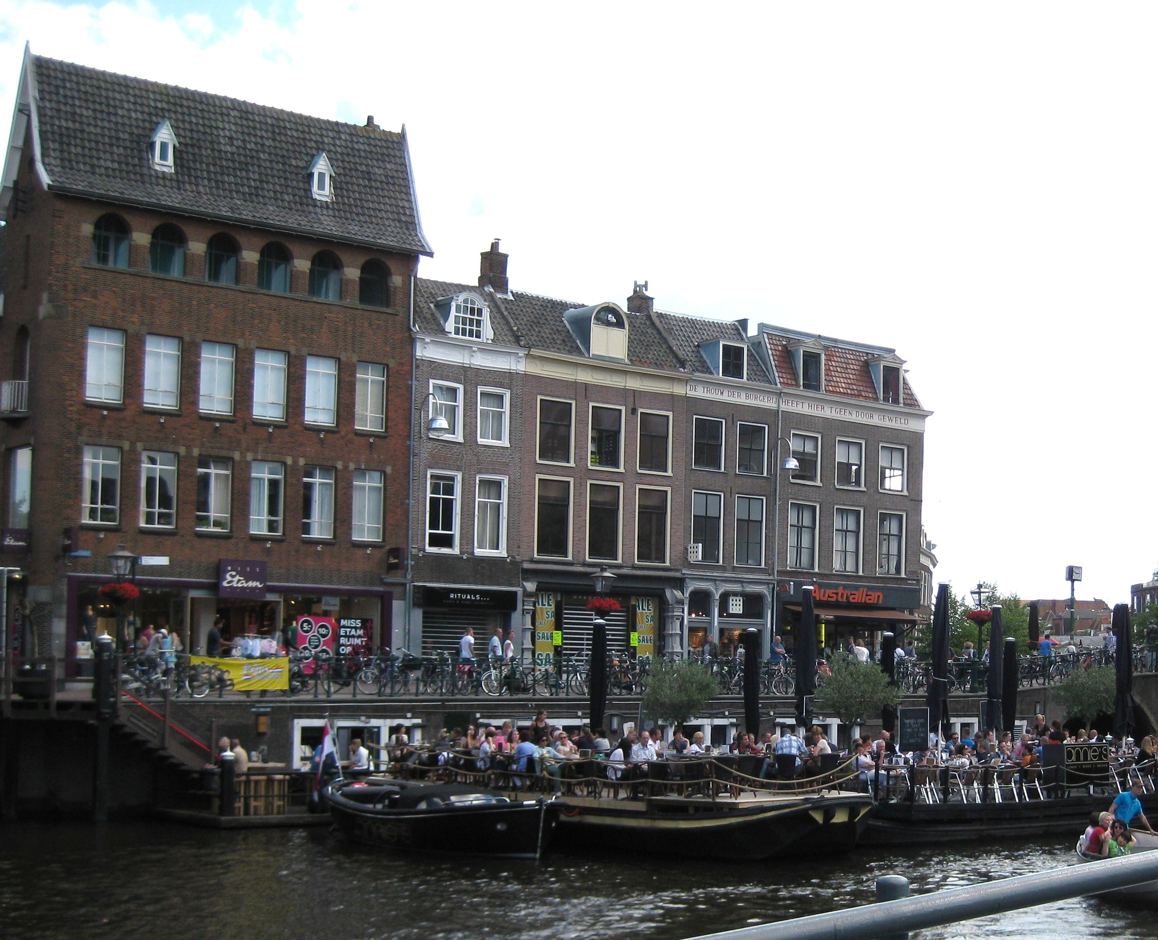 Hoogstraat in Leiden